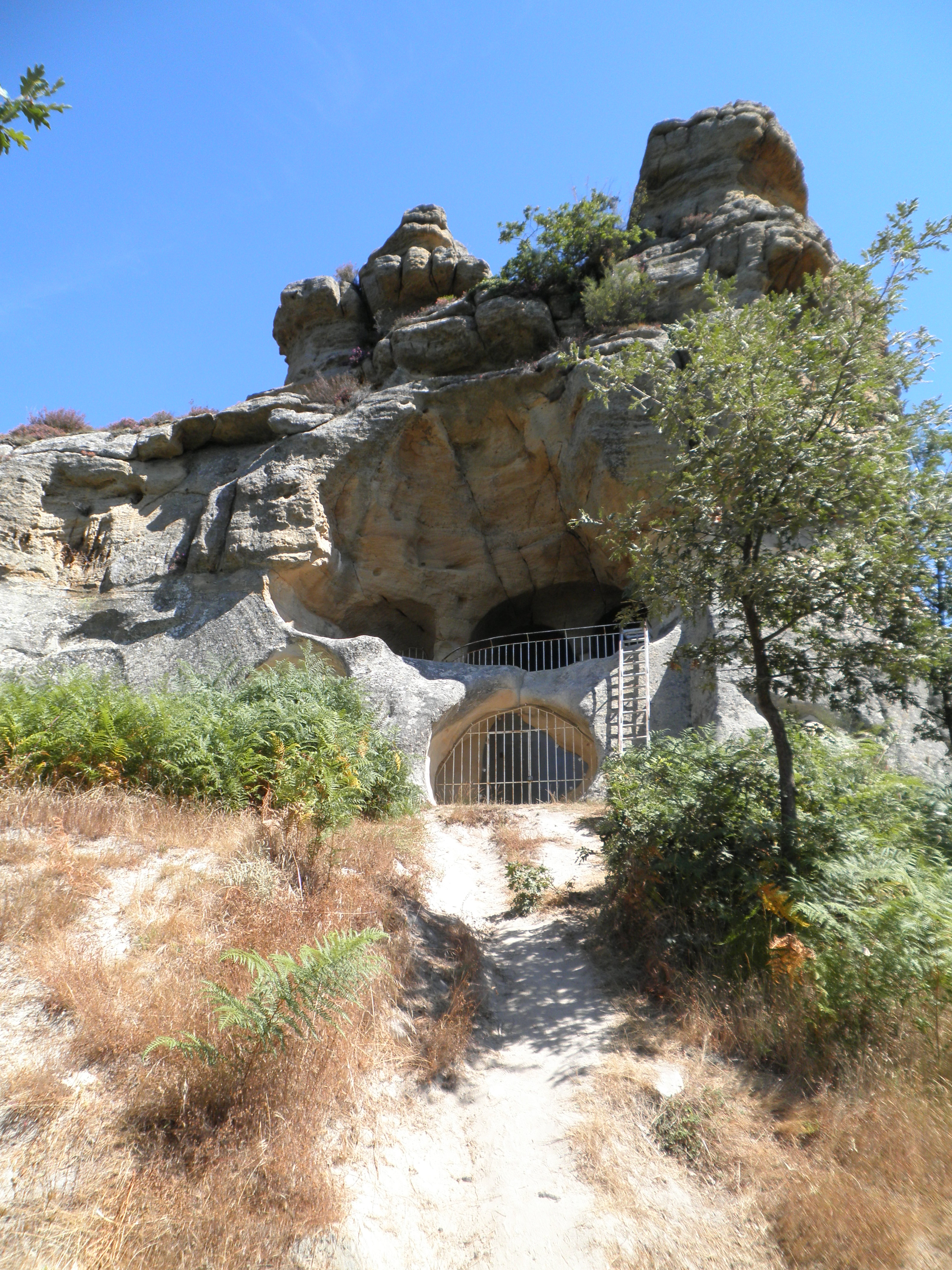 San Miguel cave chapel in Presillas, Burgos, Spain